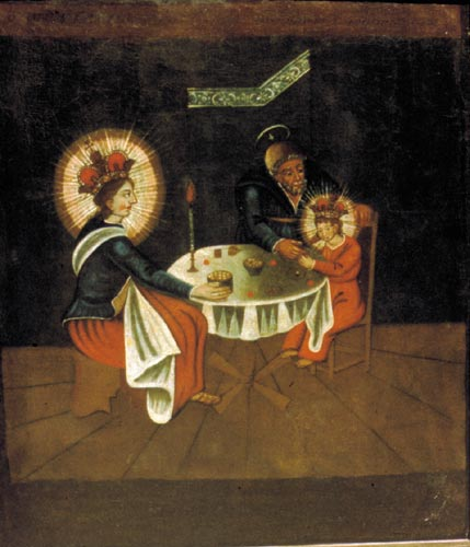 Святая Сям’я. XVIII ст. З в. Сейлавічы Нясвiжскага р-на. Музей старажытнабеларускай культуры IМЭФ НАН Беларусі